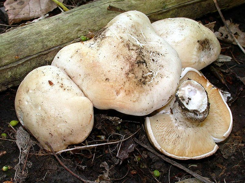 Champignon comestible Nom français : Tricholome de la Saint Georges Nom latin : Calocybe gambosa Photo : Jean-Jacques Wuilbaut Lieu : Mons (Belgique) Date : 21 avril 2002